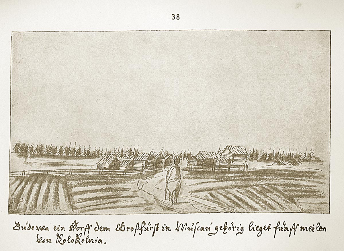 Будово